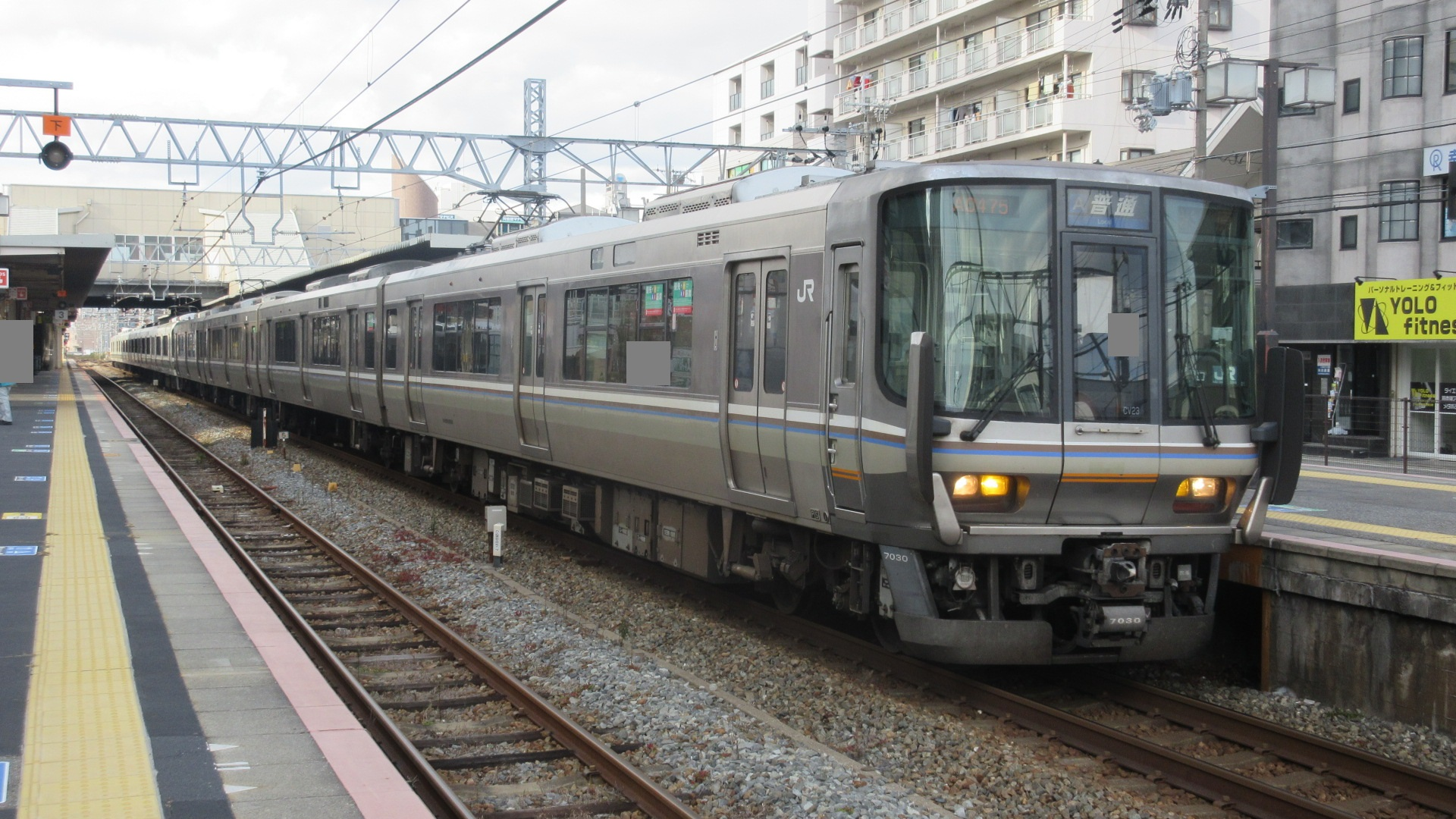 223系ホシCV23（大久保） ※ 後方に221系連結・両先頭車編成ステッカー変更済み